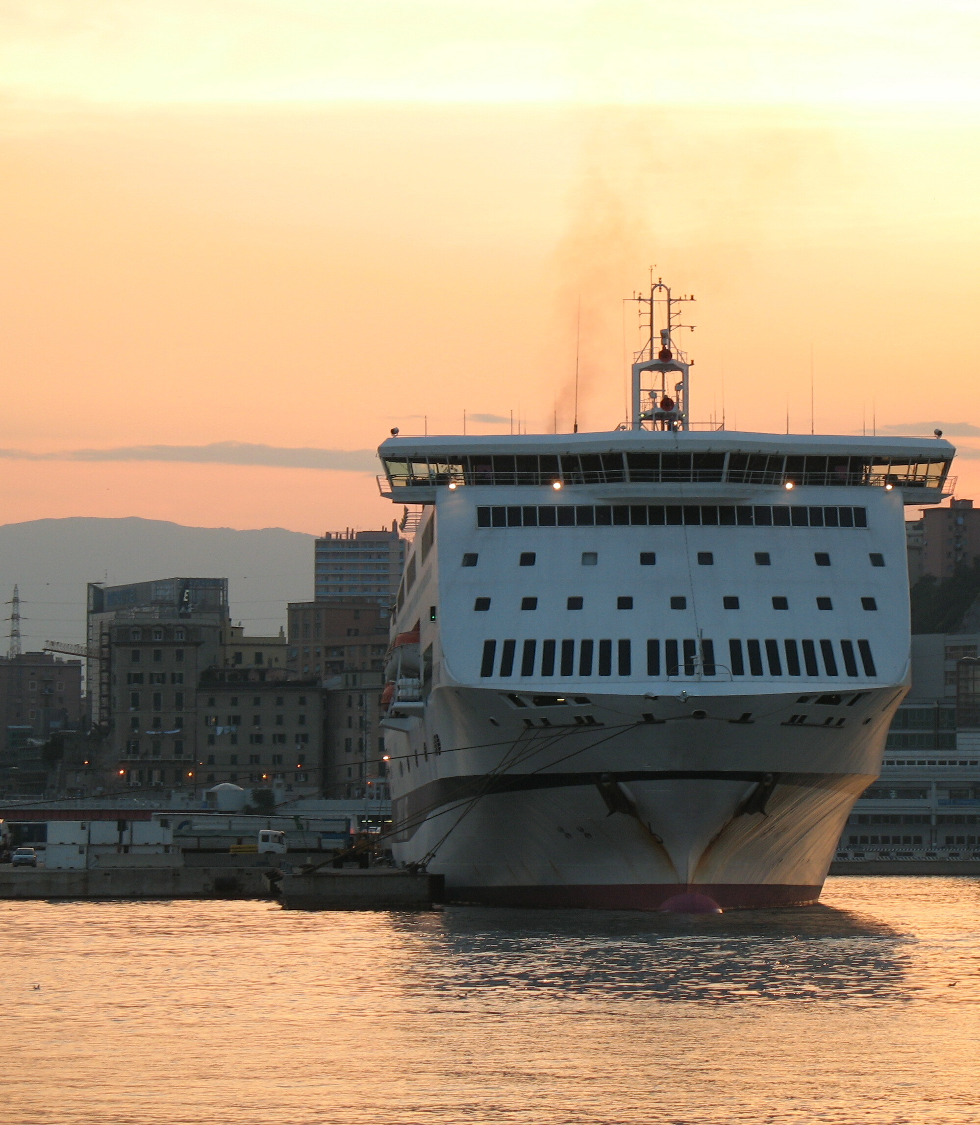 Genova - porto antico Terminal traghetti al tramonto - un traghetto sullo sfondo del Matitone